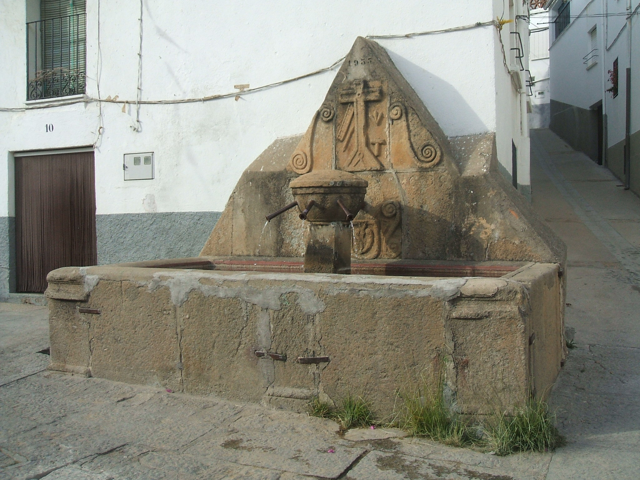 Arroyomolinos de la Vera abrevadero